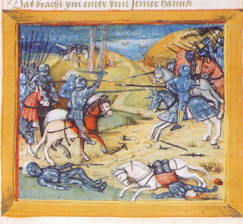 Folie 51. Tod König Niklots vor der Burg Werle.